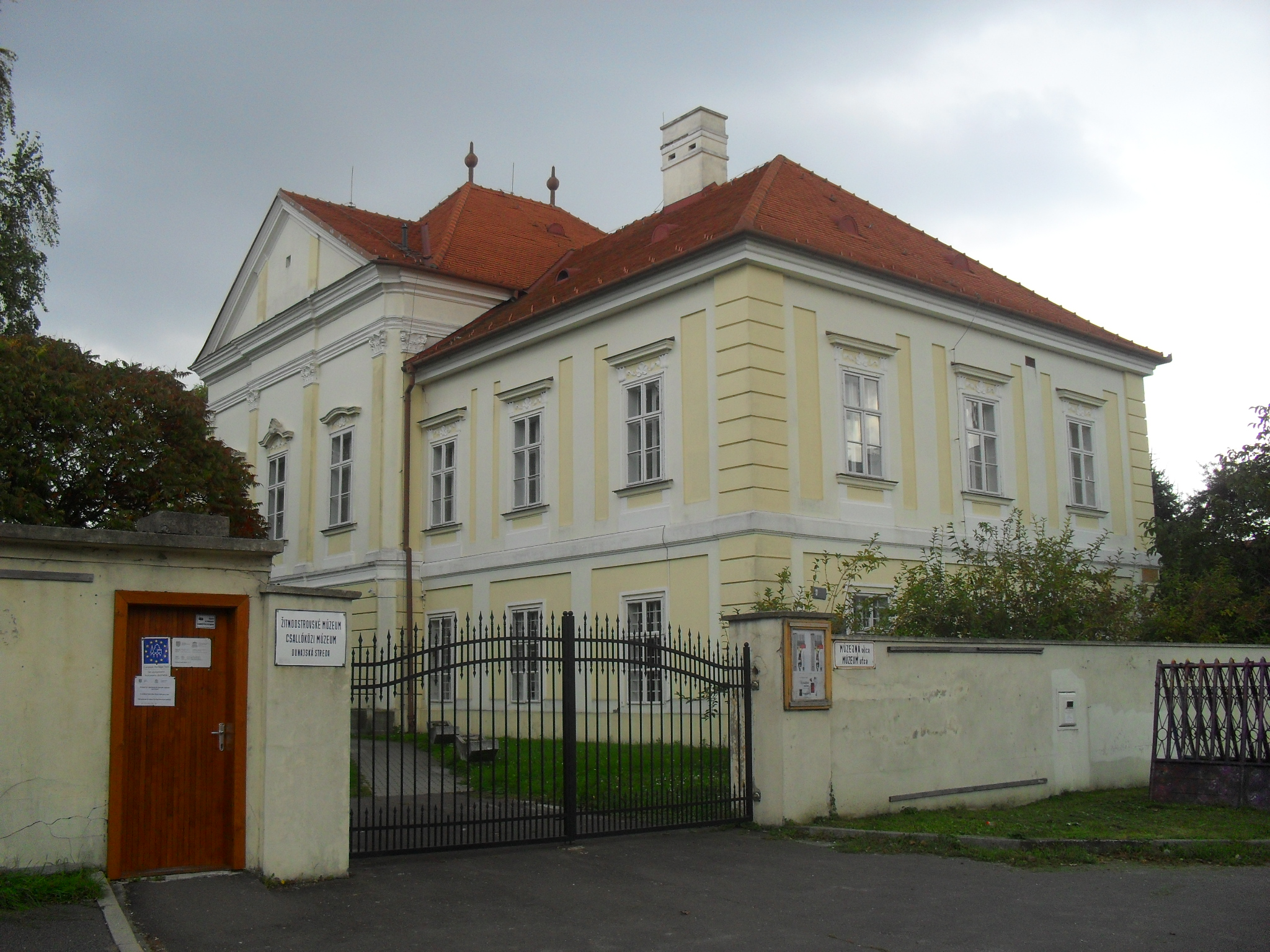 Dunaszerdahely - Csallóközi múzeum